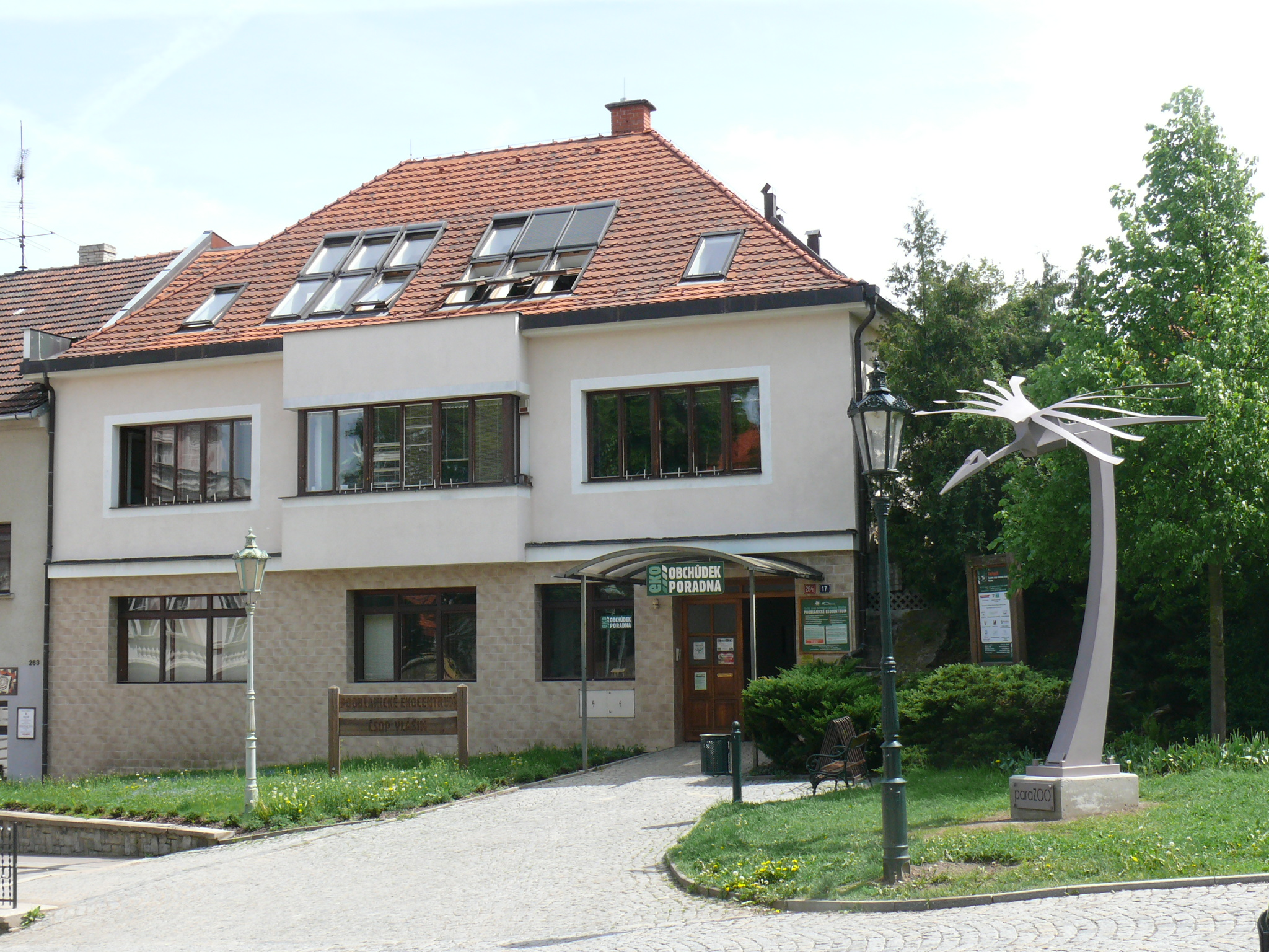 Abstraktní plastika letícího ptáka vítá návštěvníky vlašimské ParaZOO.